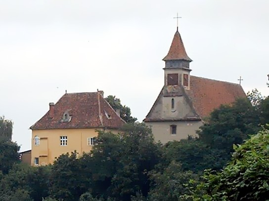 A templom a Warthe-hegyről.